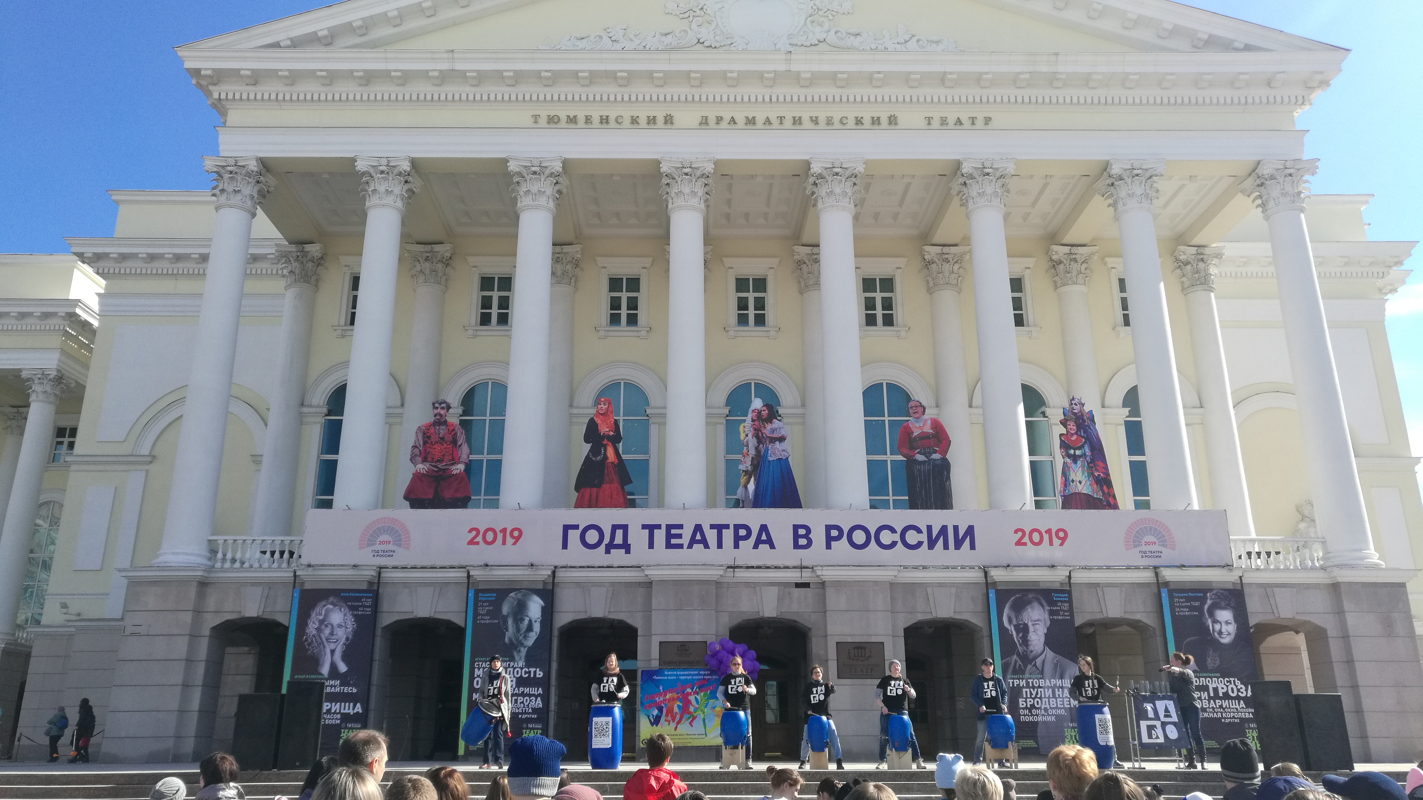 Festeno "Kreema Ekzerco" sur Placo de la 400-jariĝo de Tjumeno. Tjumeno, Rusio.